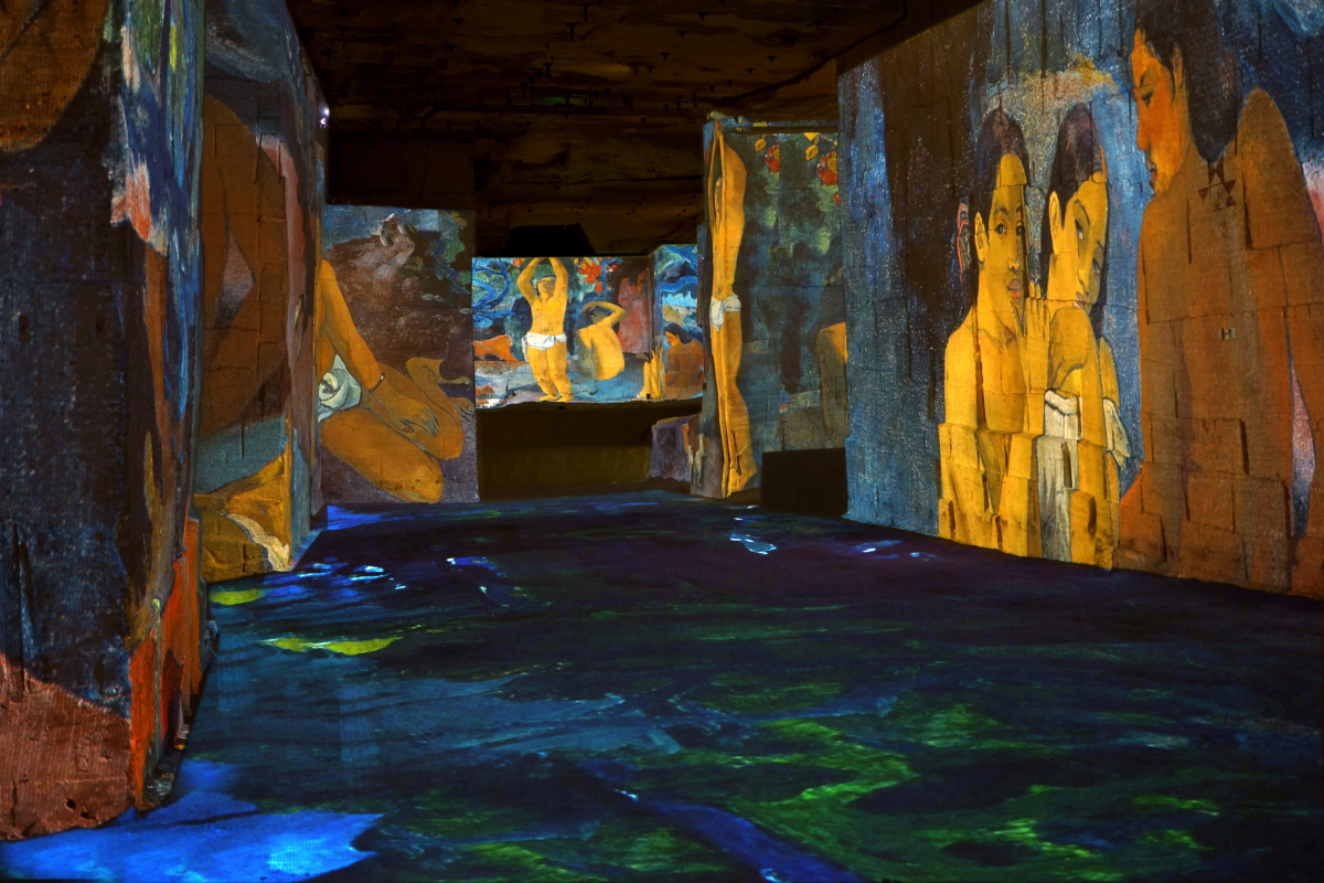 Exposition produite par Culturespaces et réalisée par Gianfranco Iannuzzi, Renato Gatto et Massimiliano Siccardi